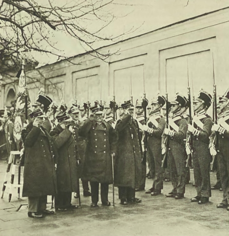 Weterani powstania styczniowego przed frontem warty w Belwederze.